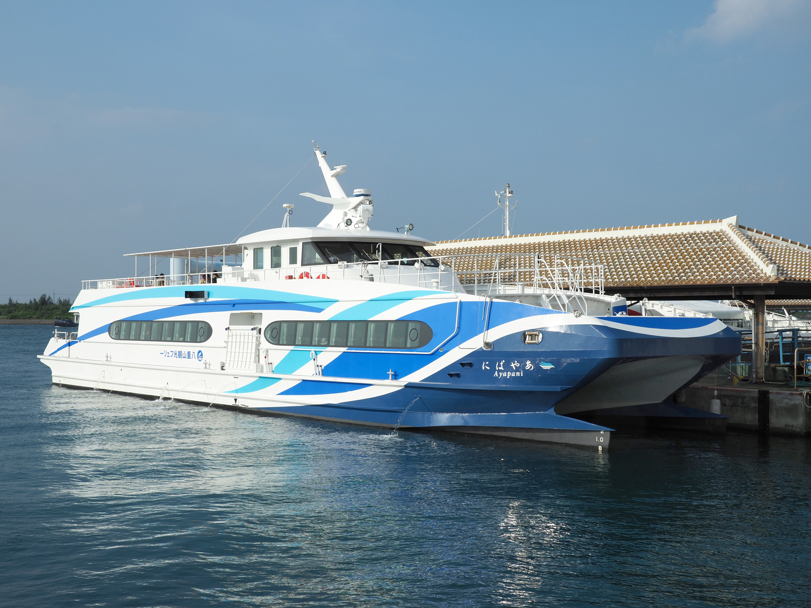 あやぱに（八重山観光フェリー、石垣港離島ターミナルにて）